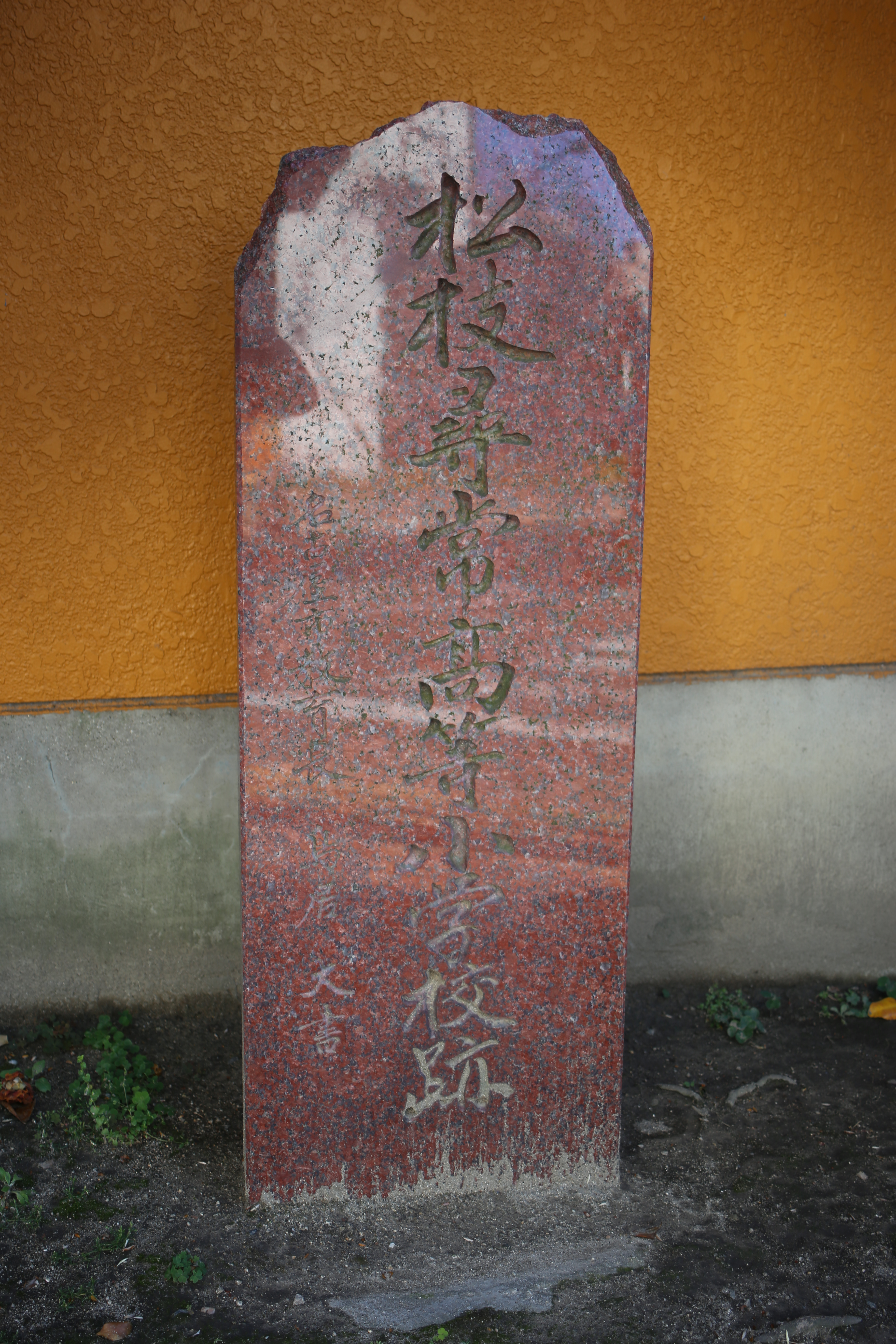 名古屋市中区千代田の松枝尋常高等小学校跡地を示す石碑